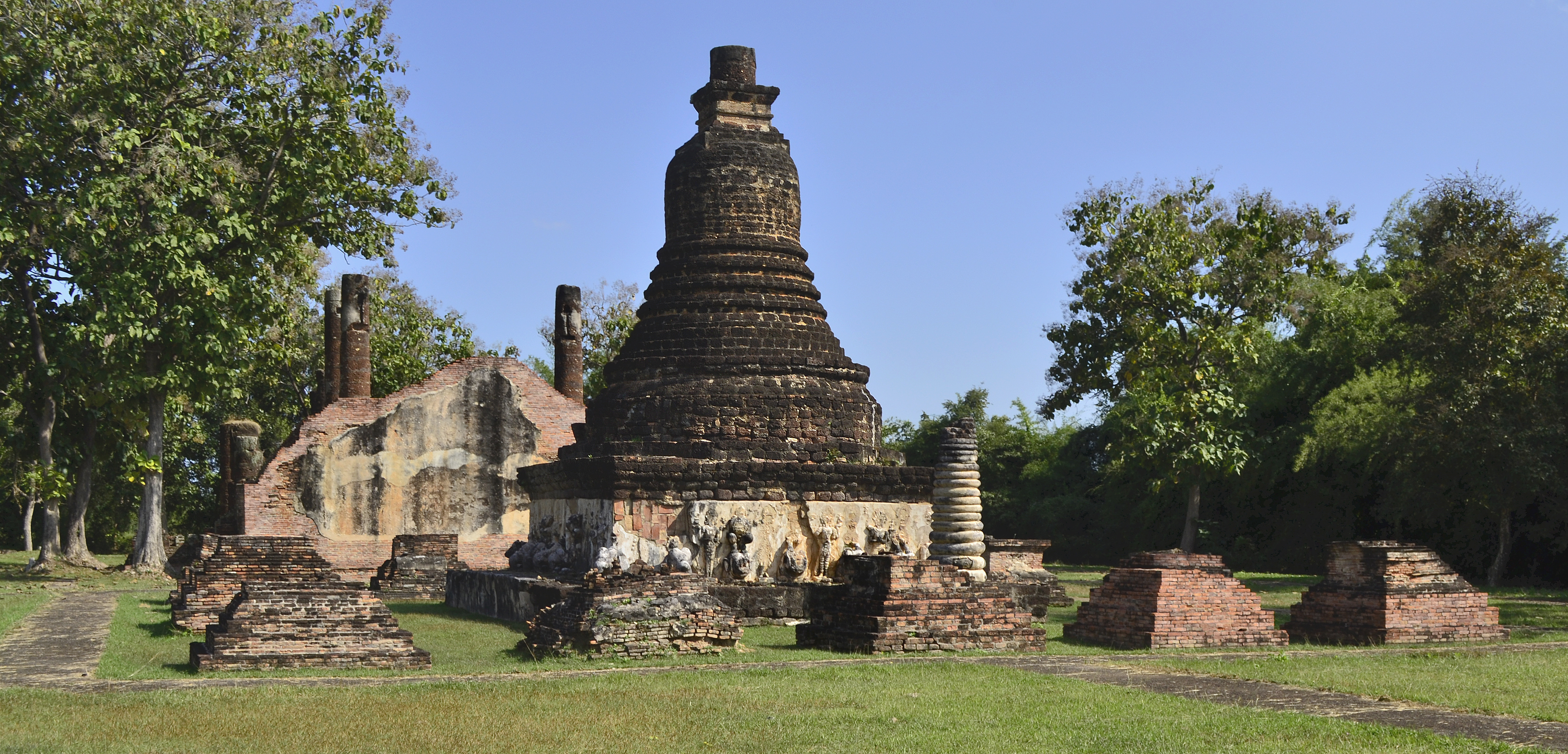 Wat Chedi Si Hong im Geschichtspark Sukhothai